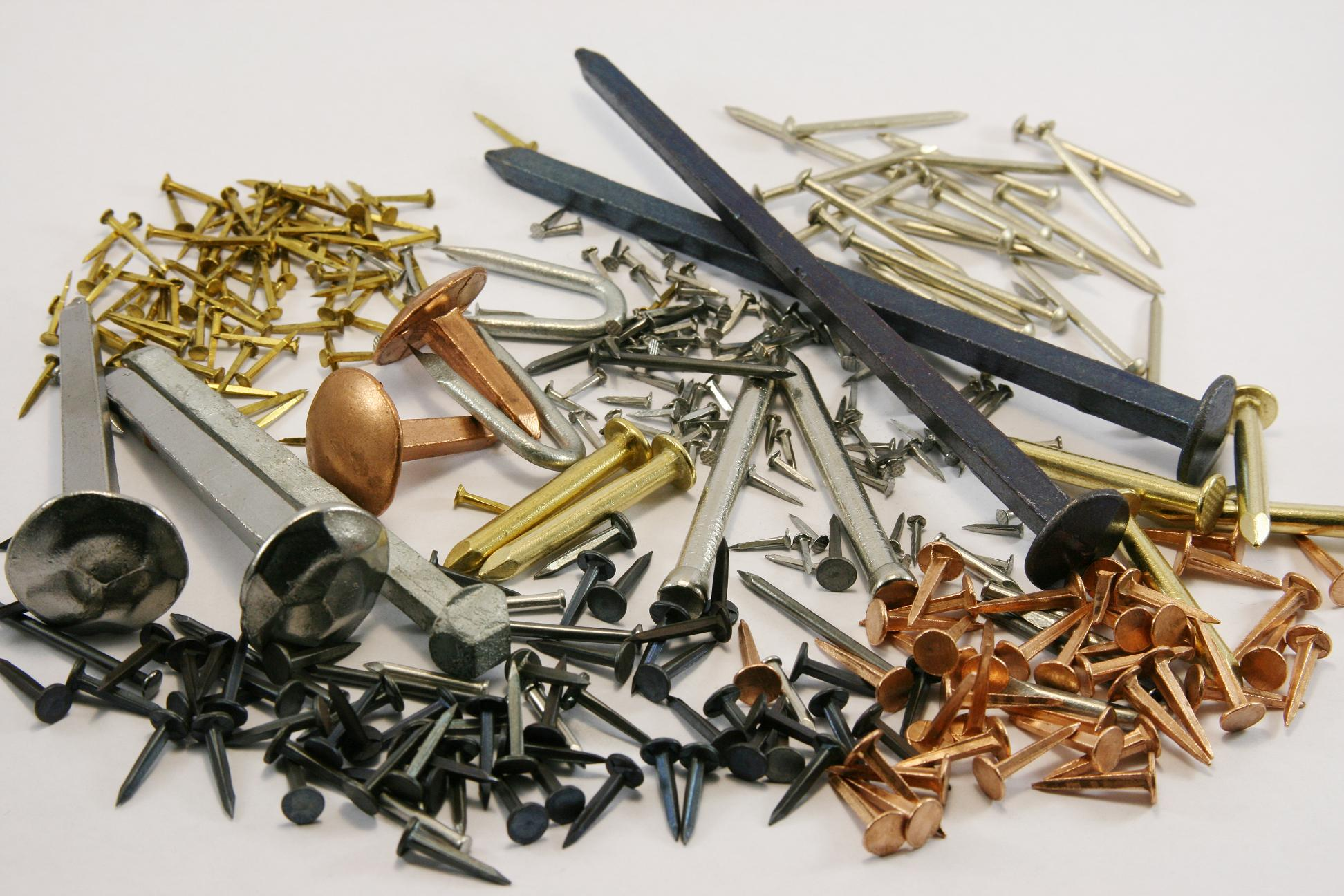 Échantillons de clous fabriqués à la Clouterie Rivierre